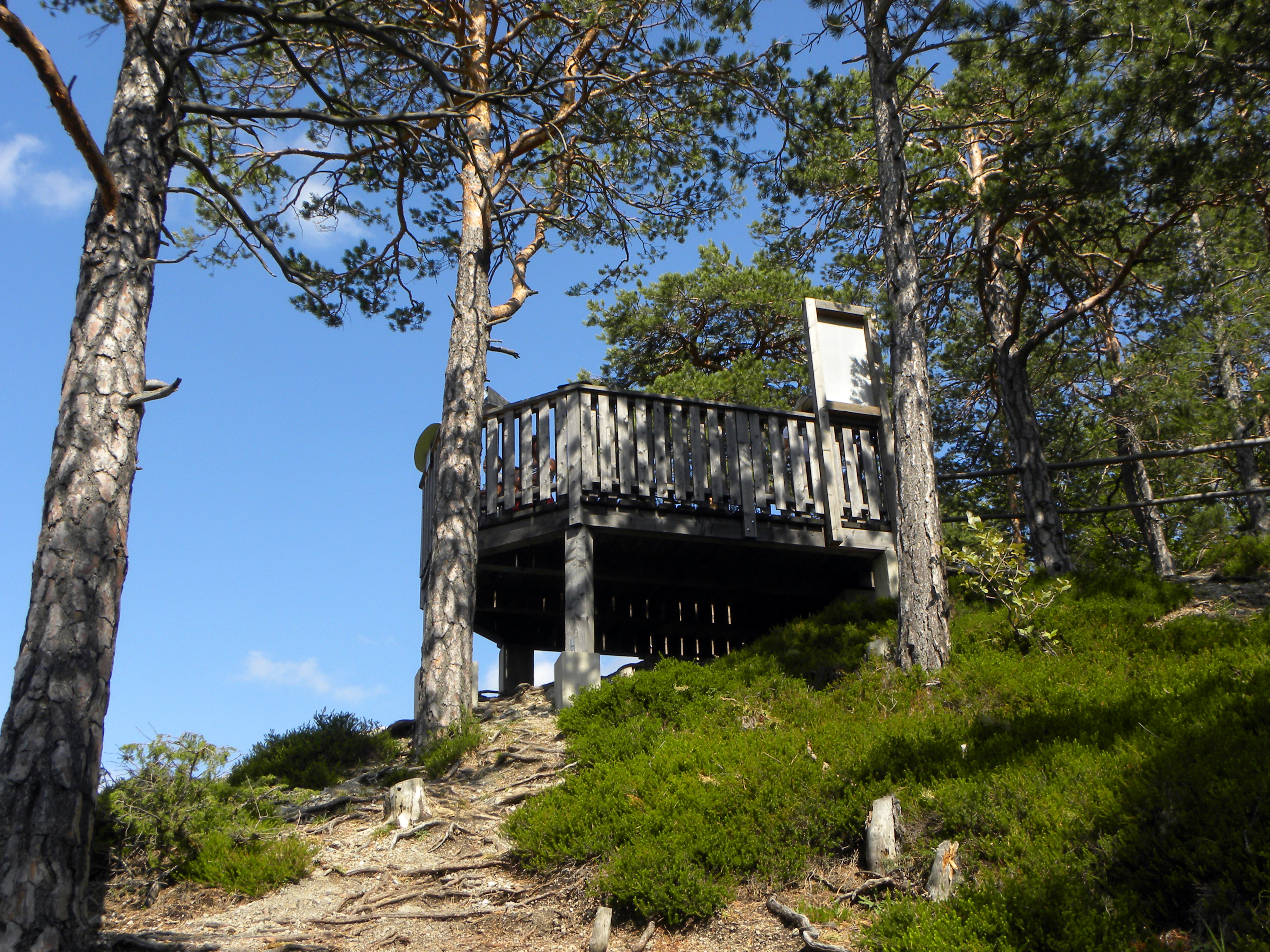 Die Aussichtsplattform "20-Schilling-Blick" trägt ihren Namen, weil die Abbildung auf dem 20-Schilling-Schein von dieser Stelle aus aufgenommen wurde.